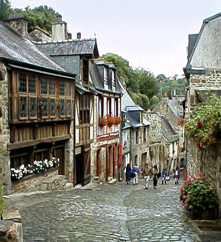 Rue du Jerzual à Dinan (22).